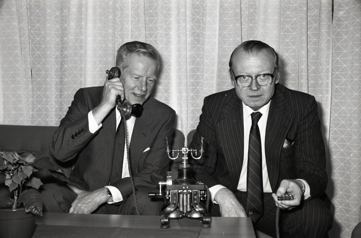 Overlevering av første digitale telefonsentral 1986. Administrerende direktør i STK Fredrik Thoresen til venstre, generaldirektør i Televerket Kjell Holler til høyre.